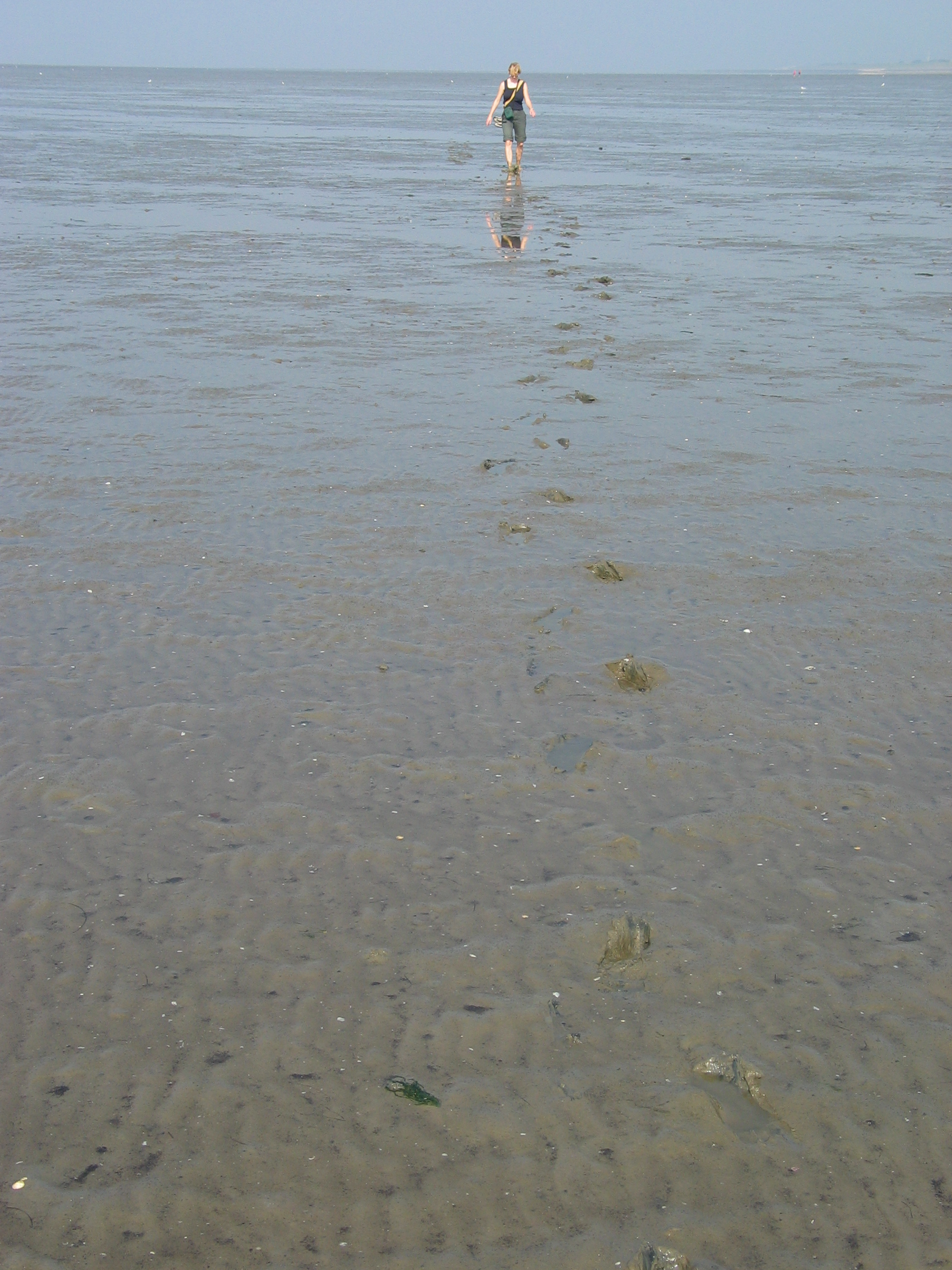 Wadden Sea near Wilhelmshaven